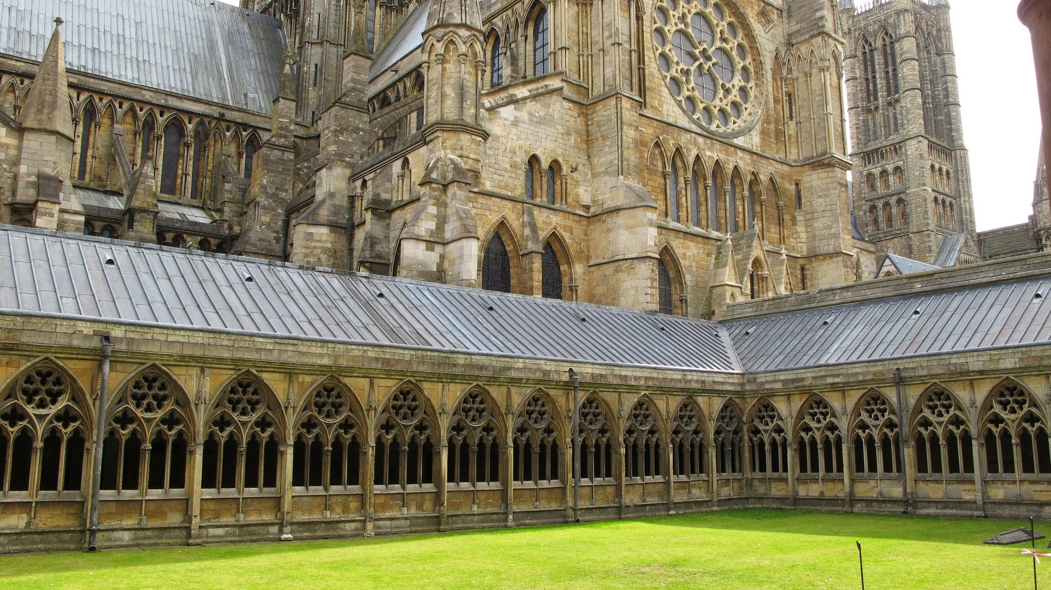 Lincoln, UK